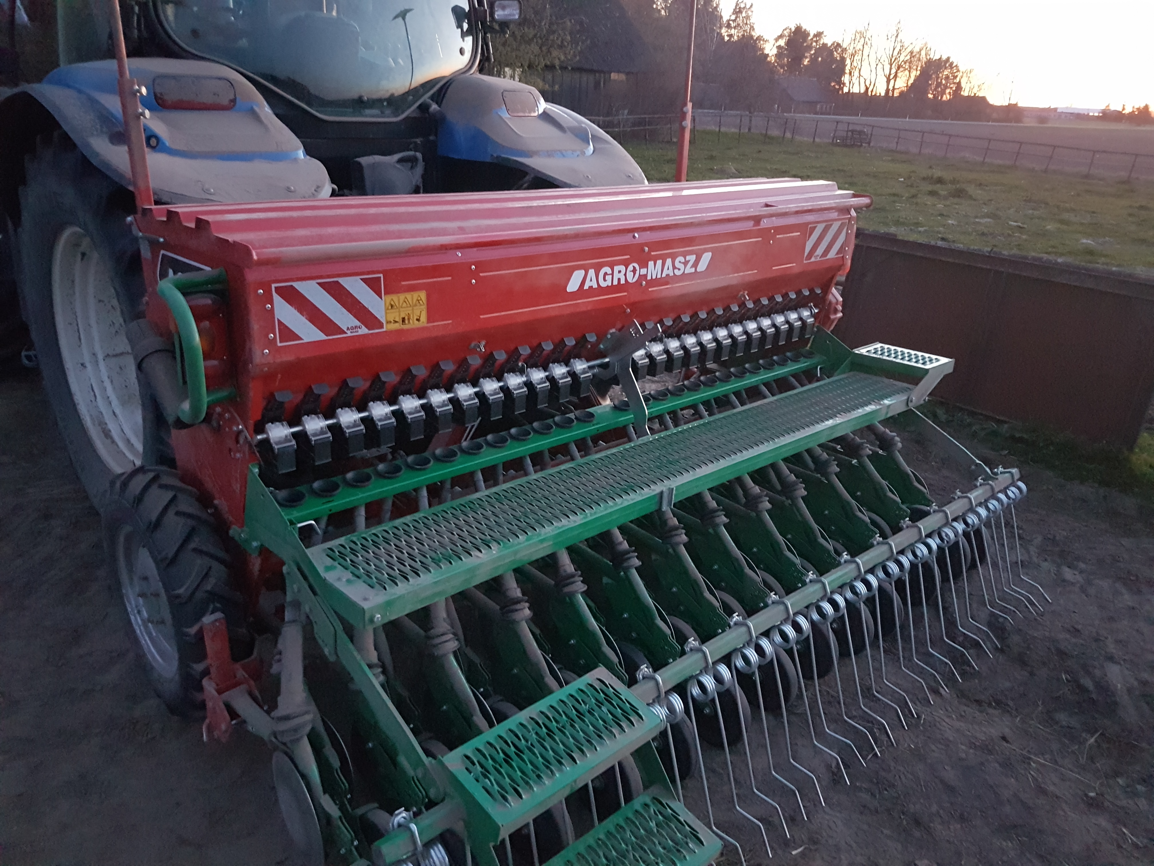 Külvik Agro-masz